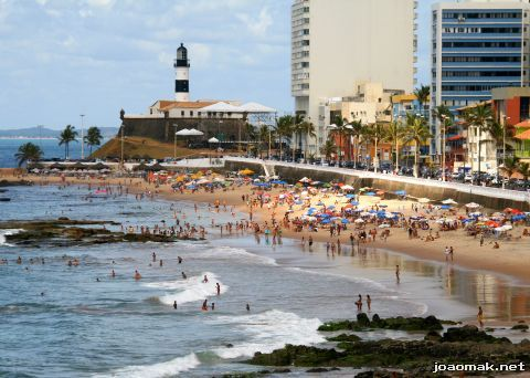 Litoral soteropolitano do bairro da Barra cheio de banhistas, Salvador, Bahia, Brasil.